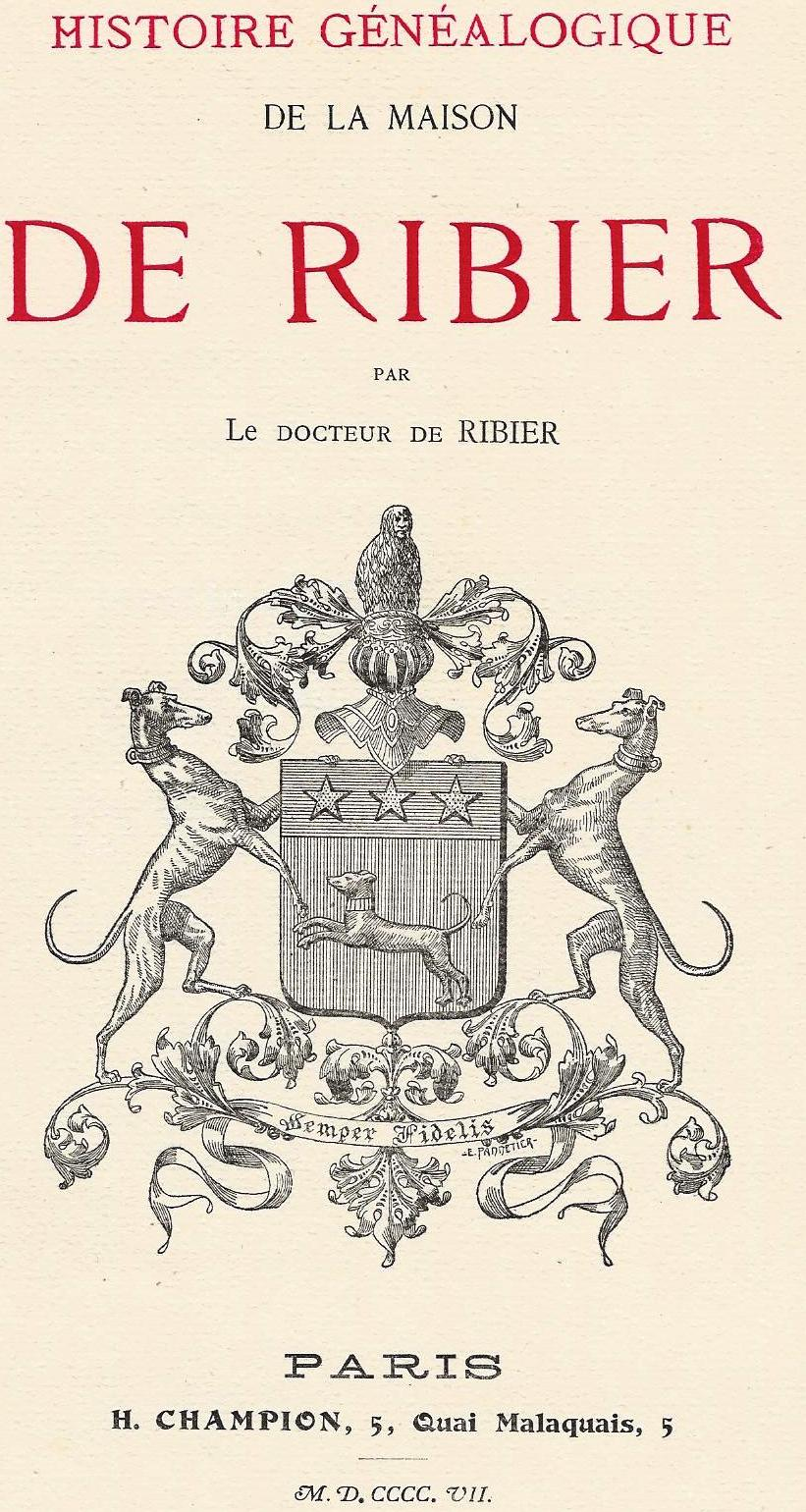 Couv. Généalogie de Ribier